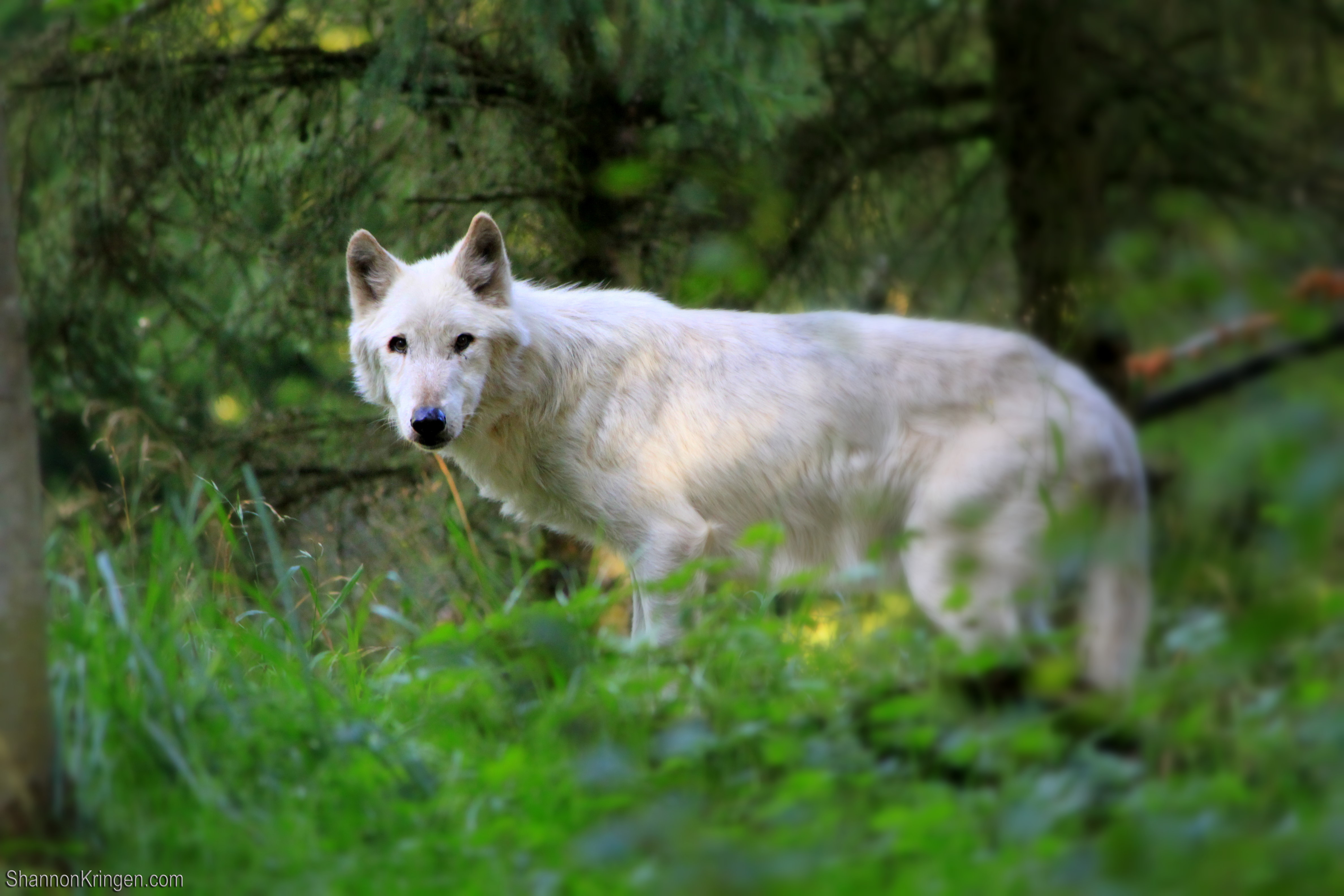 grey wolf